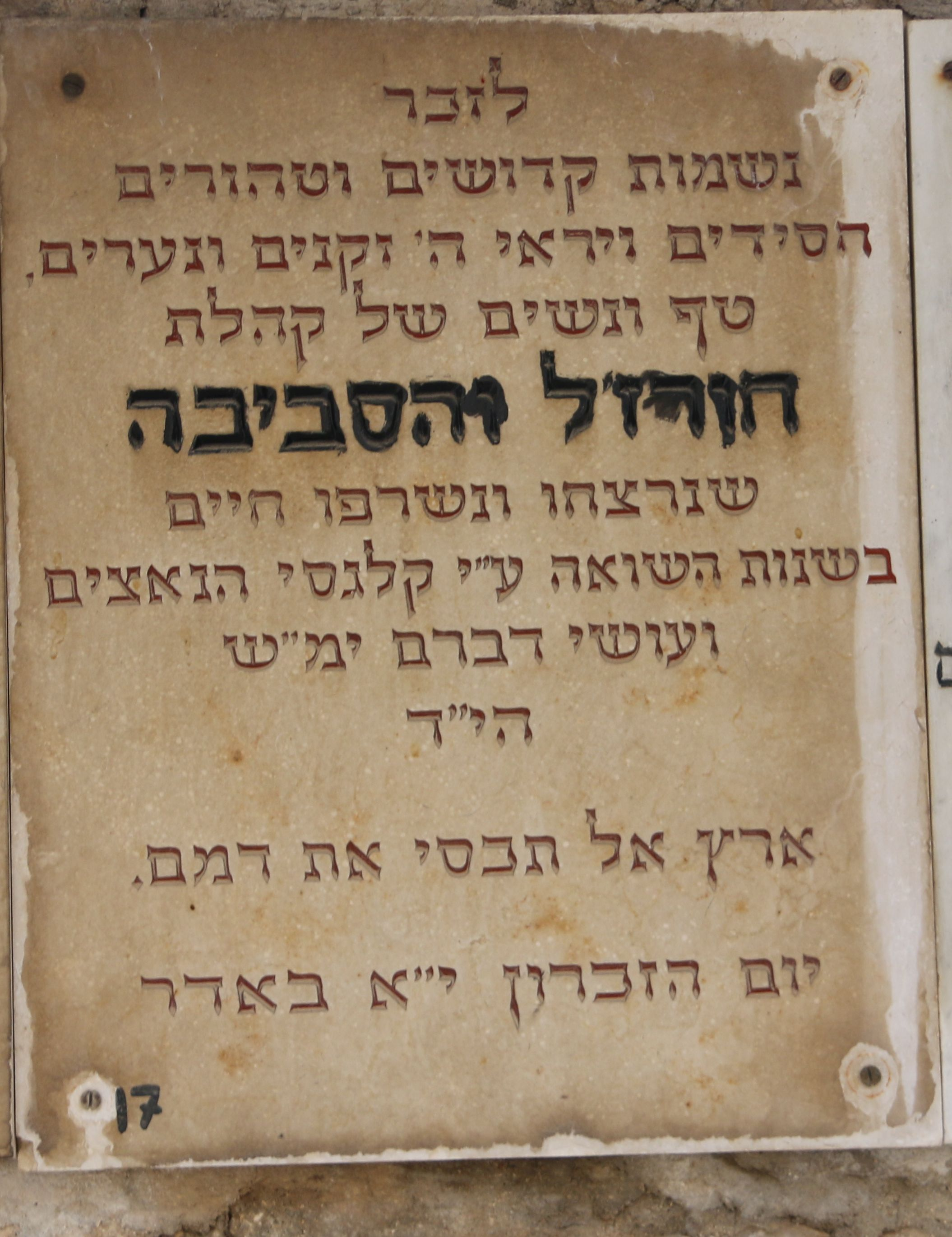 לוח זיכרון לקהילת חורז'לה במרתף השואה, הר ציון, ירושלים